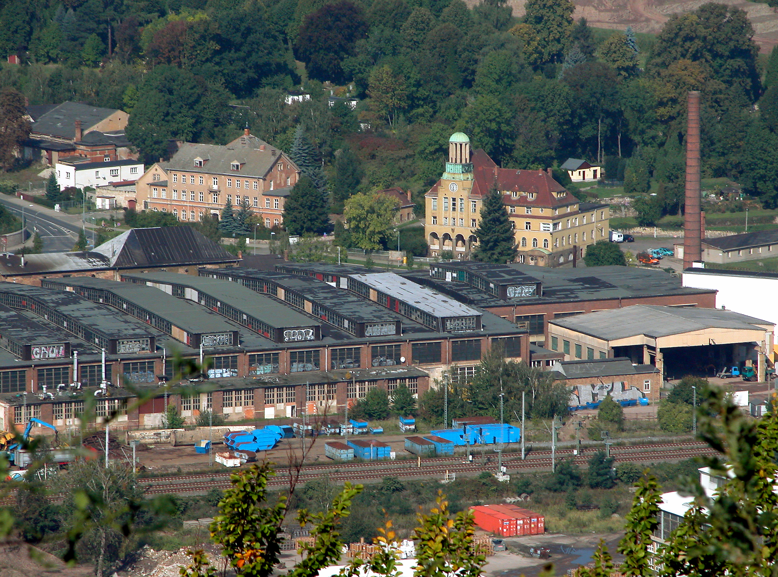 26.09.2008 01705 Freital: Sicht vom Windberg (GMP: 50.997728,13.659658) über Freital-Döhlen zur Industriehalle des ehemaligen Plastmaschinenwerkes (GMP: 51.005465,13.650230). Nach der Betriebsschließung wurde diese große Halle unter dem Namen "Windberg Arena" für Sport- und Kulturveranstaltungen genutzt. 2015 wurde sie abgerissen. Rechts hinter der Windberg-Arena sieht man das Rathaus Döhlen mit Säulentürmchen und Kupferkuppel (GMP: 51.007008,13.650152). Das Gebäude wurde 1914-1915 nach Plänen von Rudolf Bitzan errichtet. Am 01.10.1921 wurde hier die Stadt Freital gegründet. Später verschiedenen Nutzungen, u.a. als Landratsamt. [DSCN34182.TIF]20080926100DR.JPG(c)Blobelt